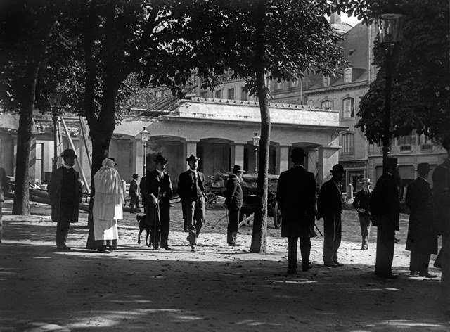 Luxembourg, démolition de la garde principale de la garnison prussienne vers 1903